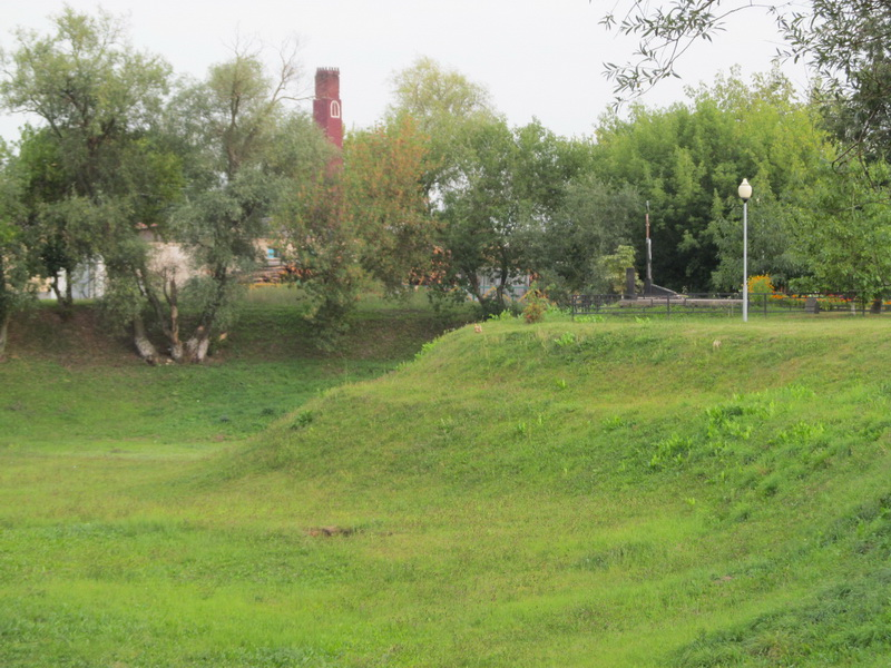 Быхаў. Гарадскія ўмацаванні